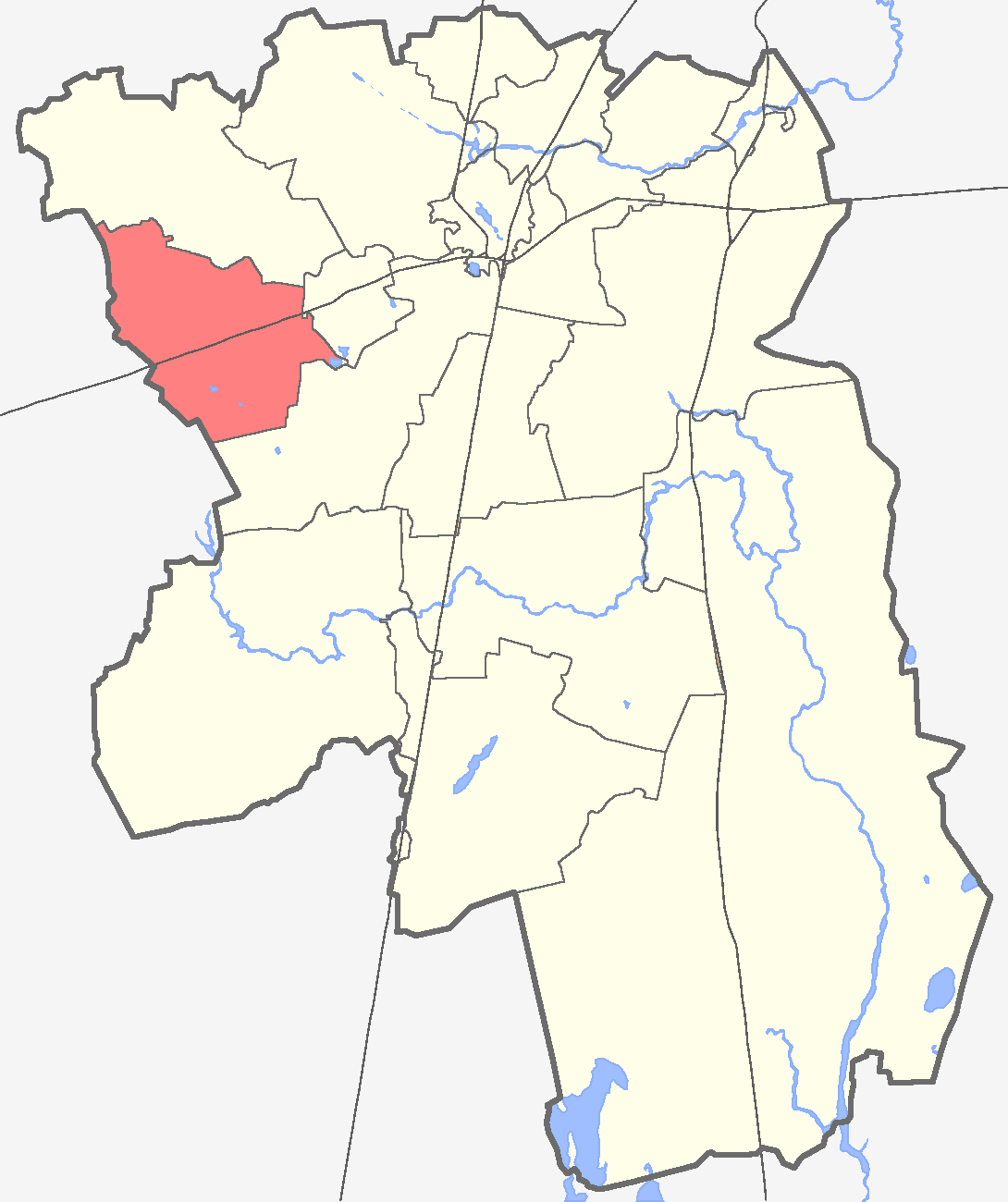 Елизаветинское сельское поселение на карте Гатчинского района